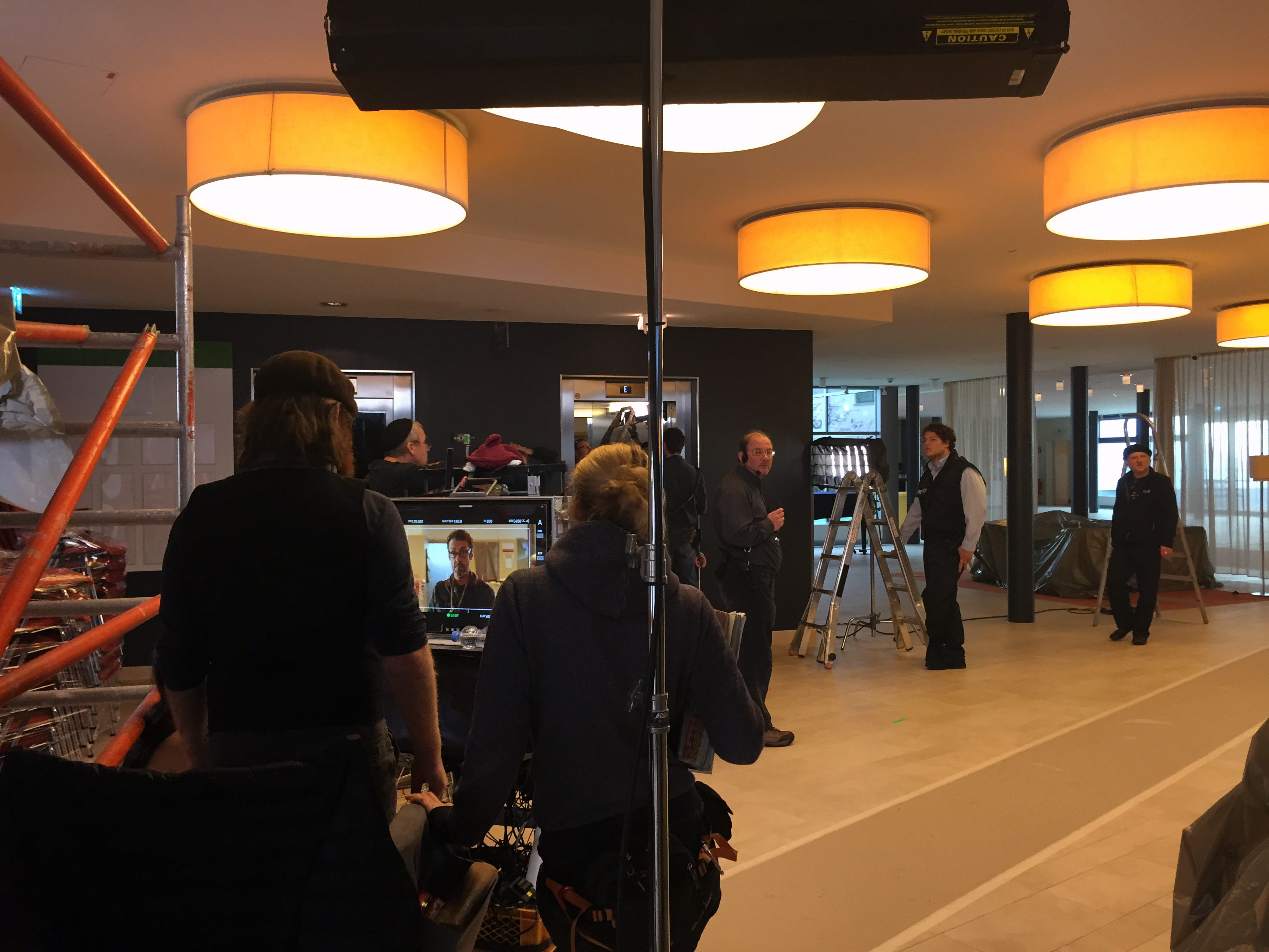 Bild vom Film dreh des "Tatort: Das Muli" für den RBB.